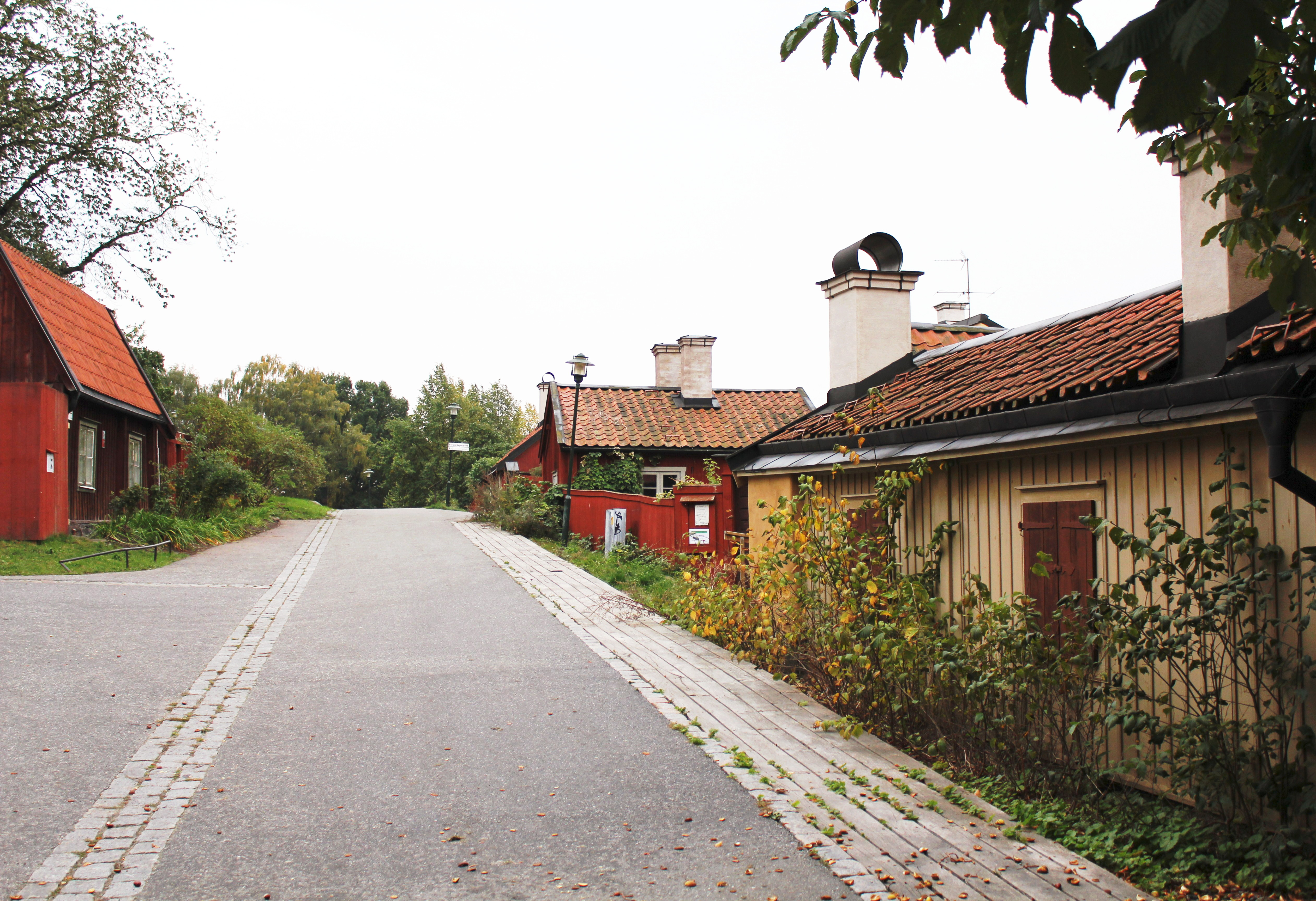 Mäster Pers gränd i Vitabergsparken på Södermalm i Stockholm.